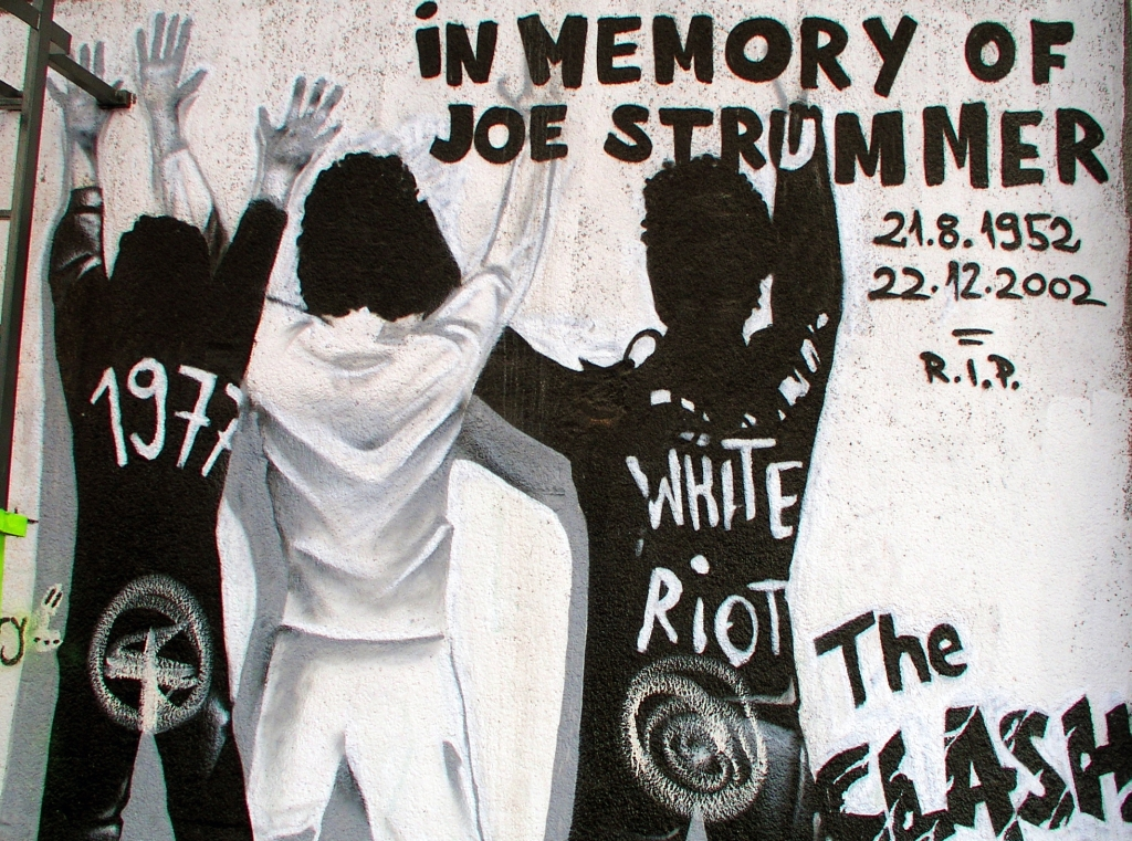 grafiti u Rijeci (Mrtvi kanal)